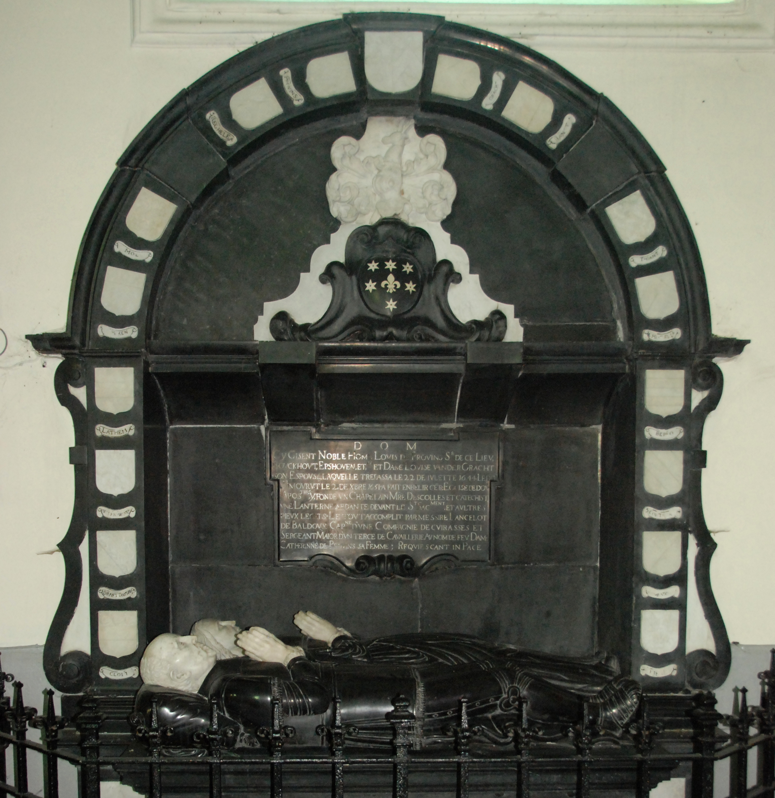 Belgique - Brabant wallon - Église de Court-Saint-Étienne - Enfeu de Louis de Provins